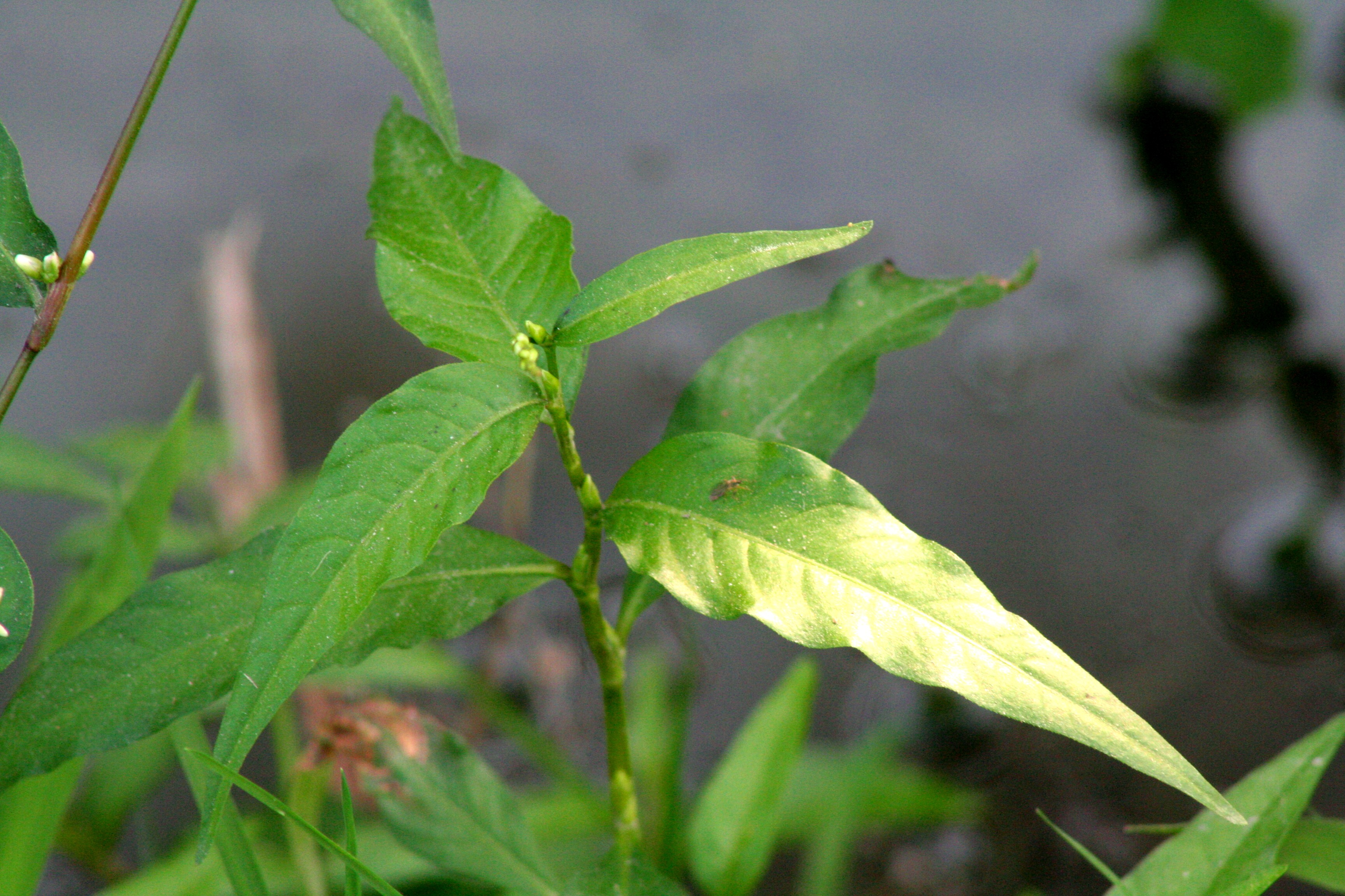 Persicaria_mitis (Polygonum mite) - Persicaria mite Località Canizzano (TV), quota 10 m s.l.m.